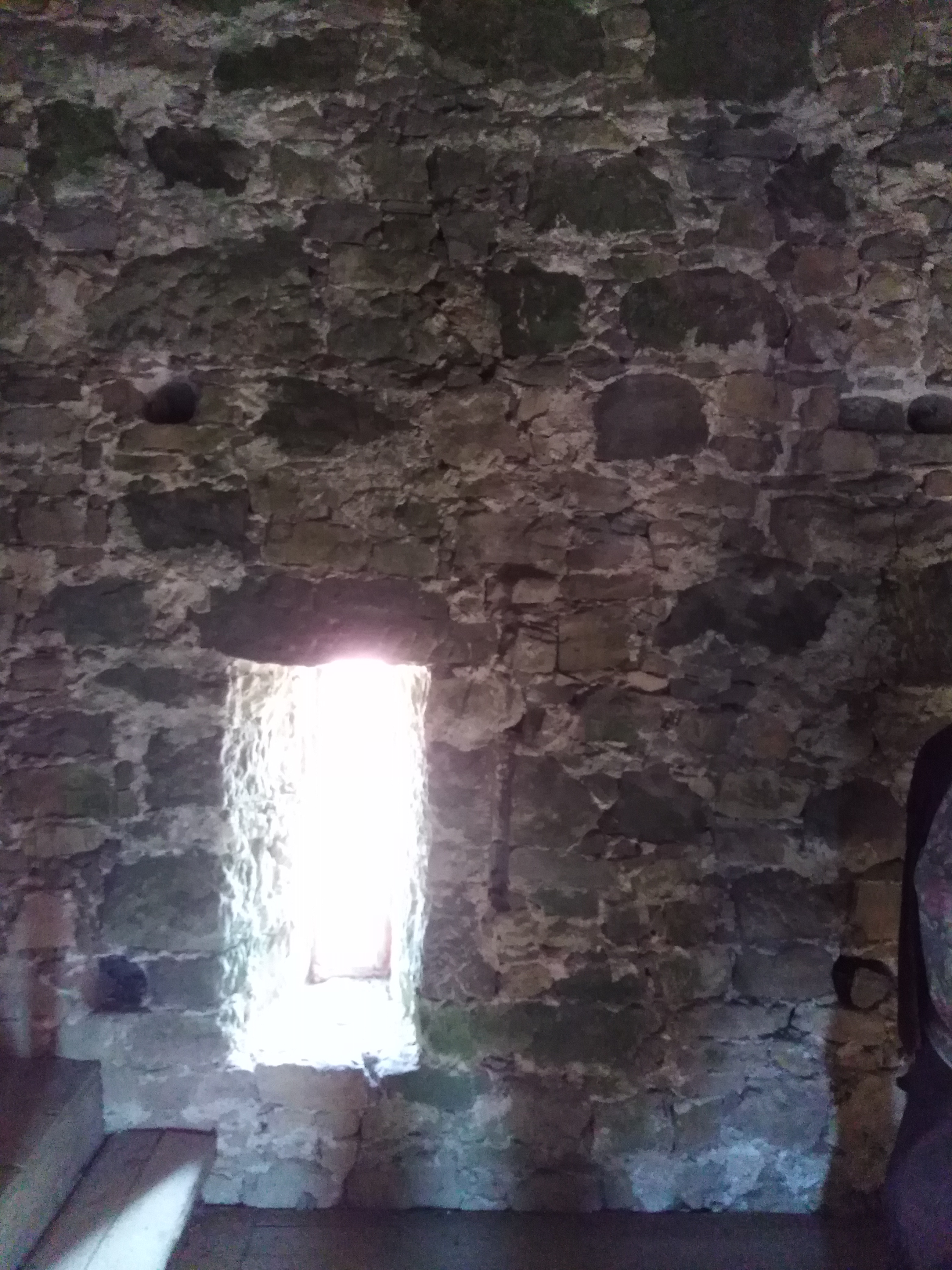 Bochingen St. Mauritius Turm innen